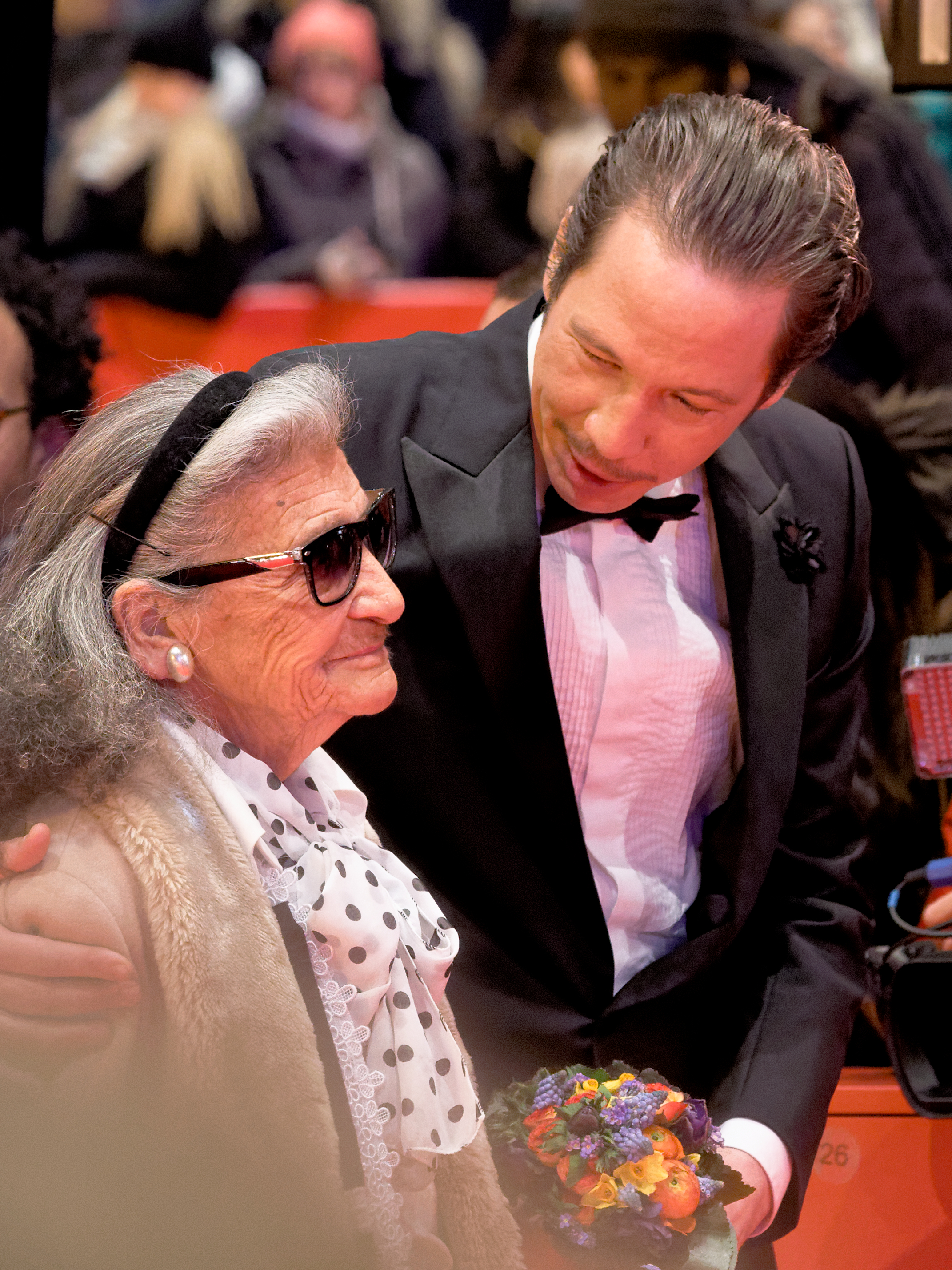 Reda Kateb mit Bim Bam Merstein bei der Weltpremiere von Django bei der Berlinale 2017